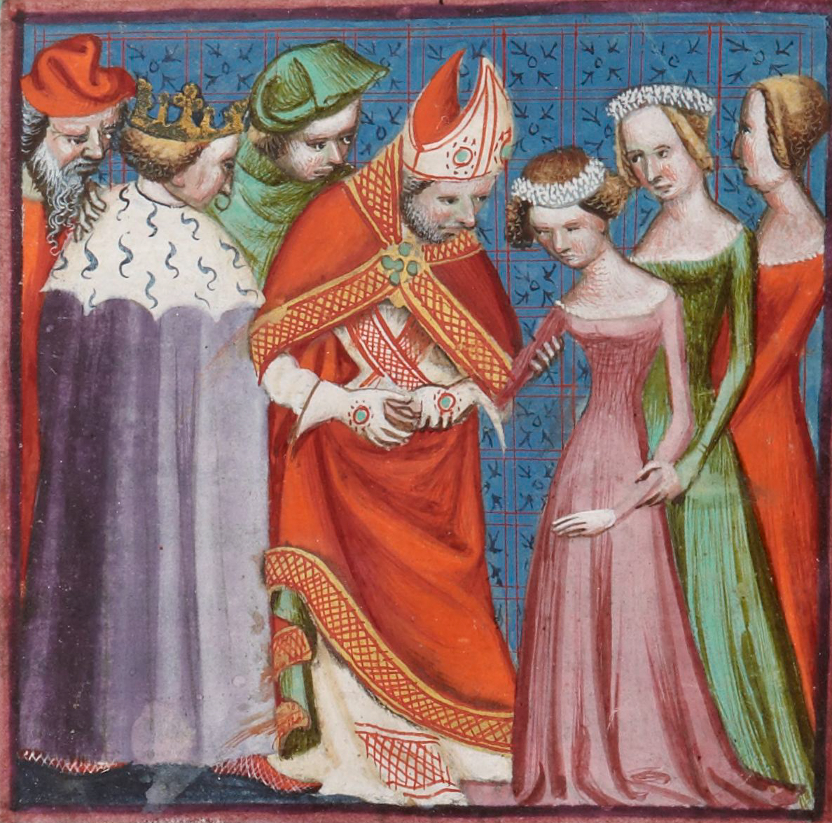 Mariage de Charles IV le Bel et de Marie de Luxembourg. Enluminure provenant d'un manuscrit des Grandes chroniques de France